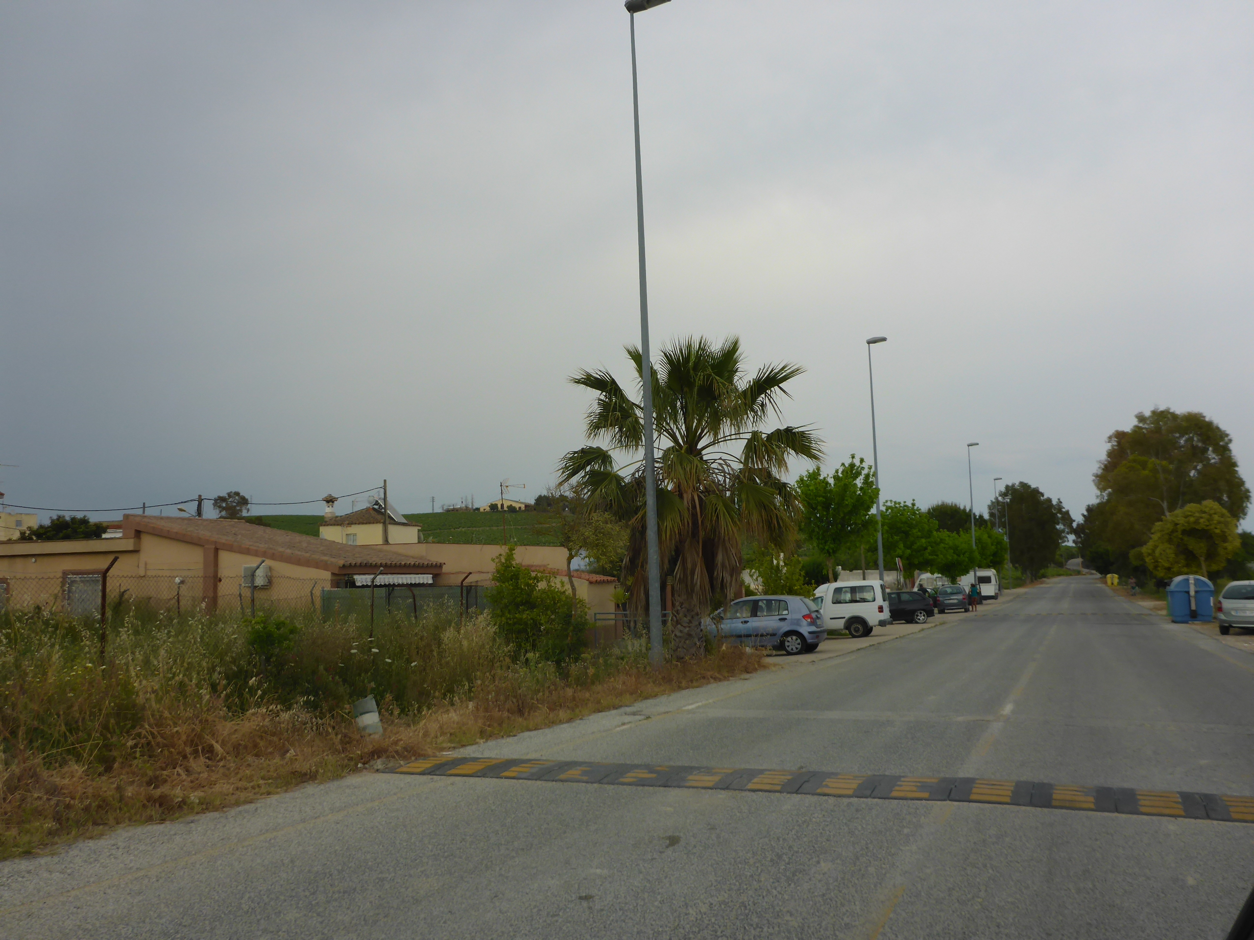 Polila, Jerez de la Frontera